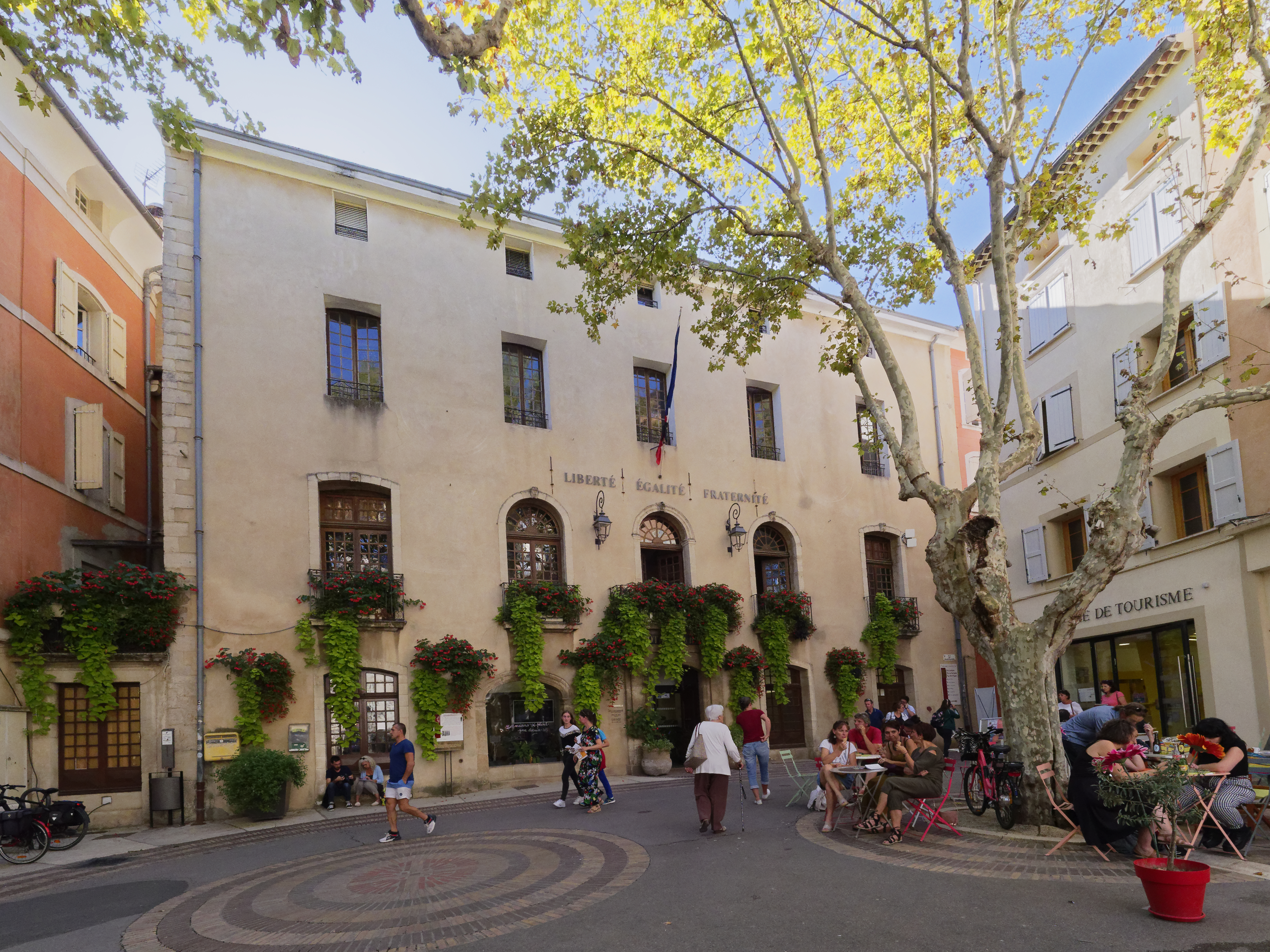 Mairie